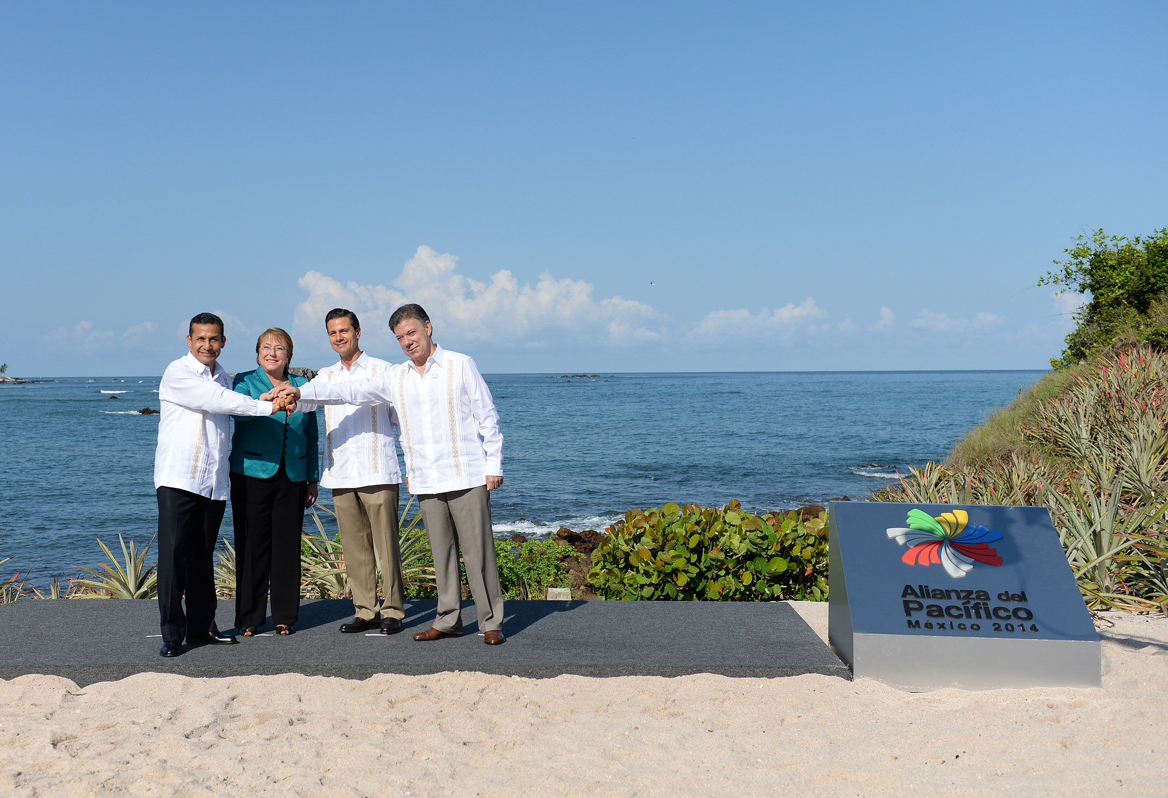 La Presidenta Michelle Bachelet participó en la fotografía oficial de la IX Cumbre de la Alianza del Pacífico